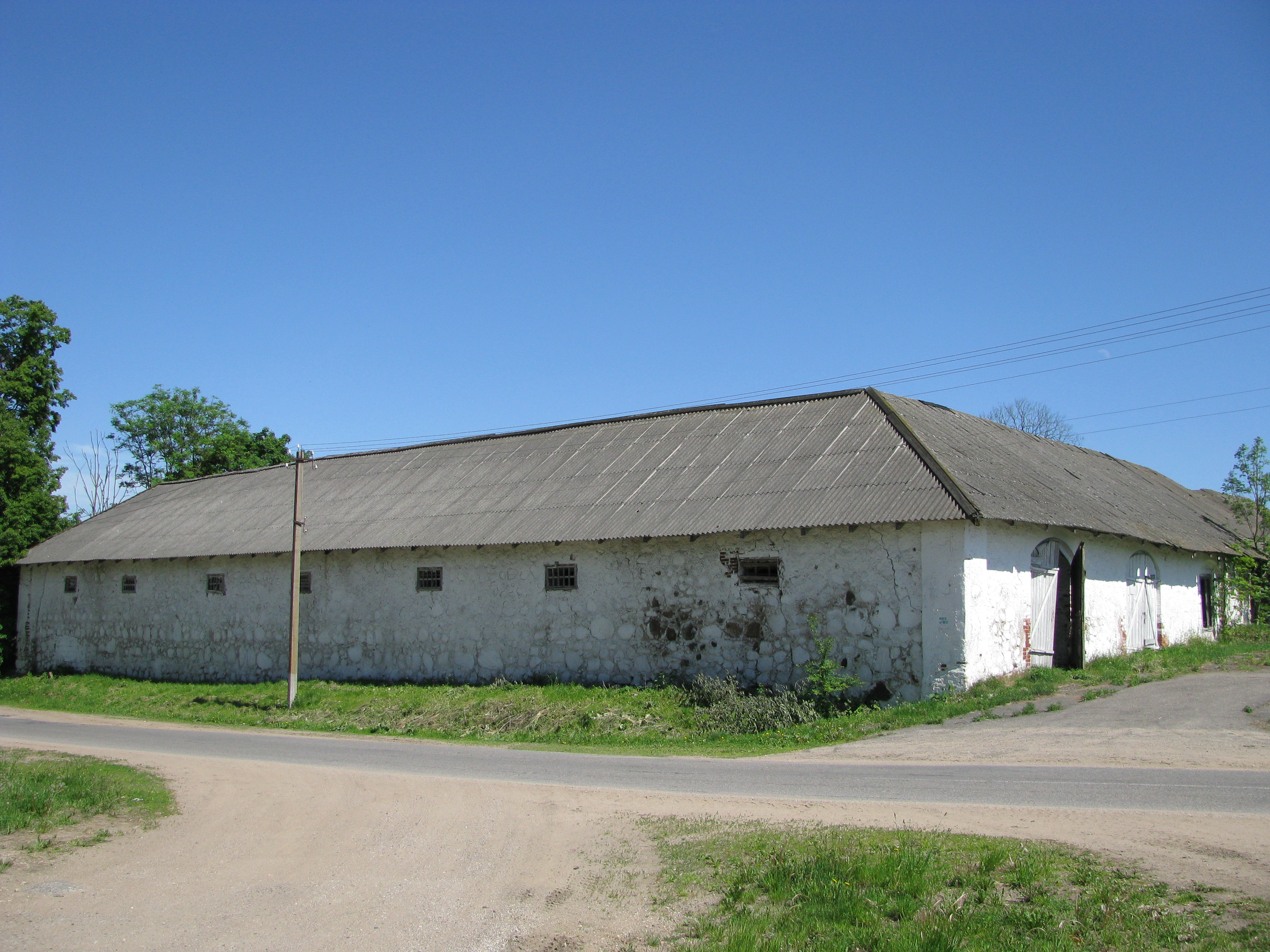 Беларуская (тарашкевіца): Комплекс былой сядзібыЗіберг-Плятэра:палац капліцагаспадарчыя пабудовыуязная брама. в. Гарадзец This is a photo of Belarusian heritage monument. Reference number: 212Г000836 ( WLM)